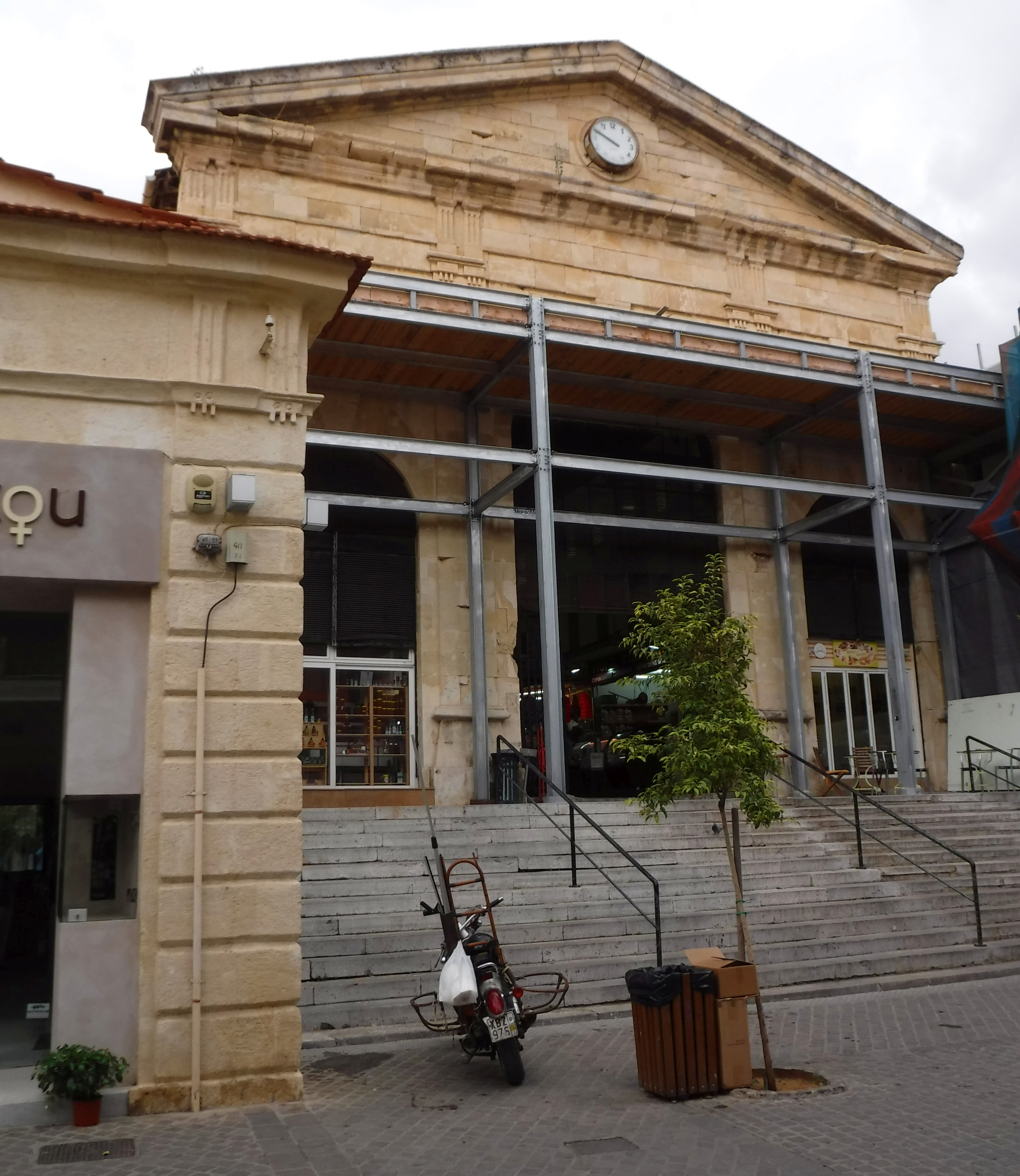 The Market Hall in Chania / Crete (Dimotiki Agora Chanion), view from SW